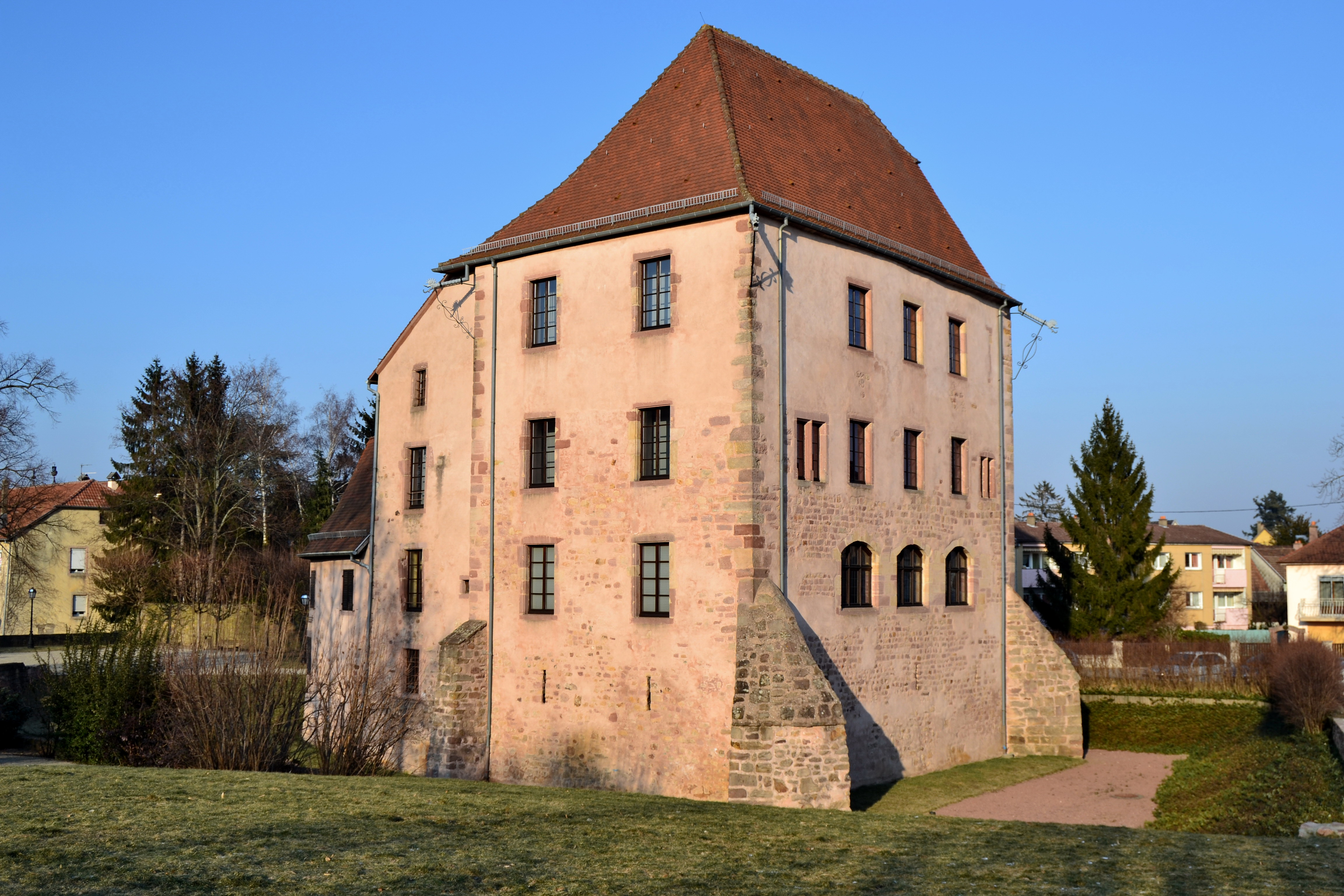 Soultz - Château du Bucheneck